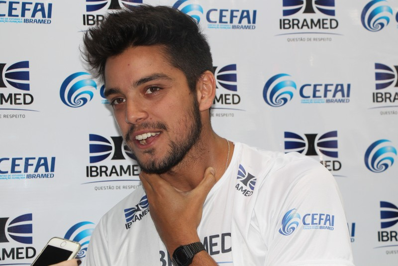 Rodrigo Simas-010